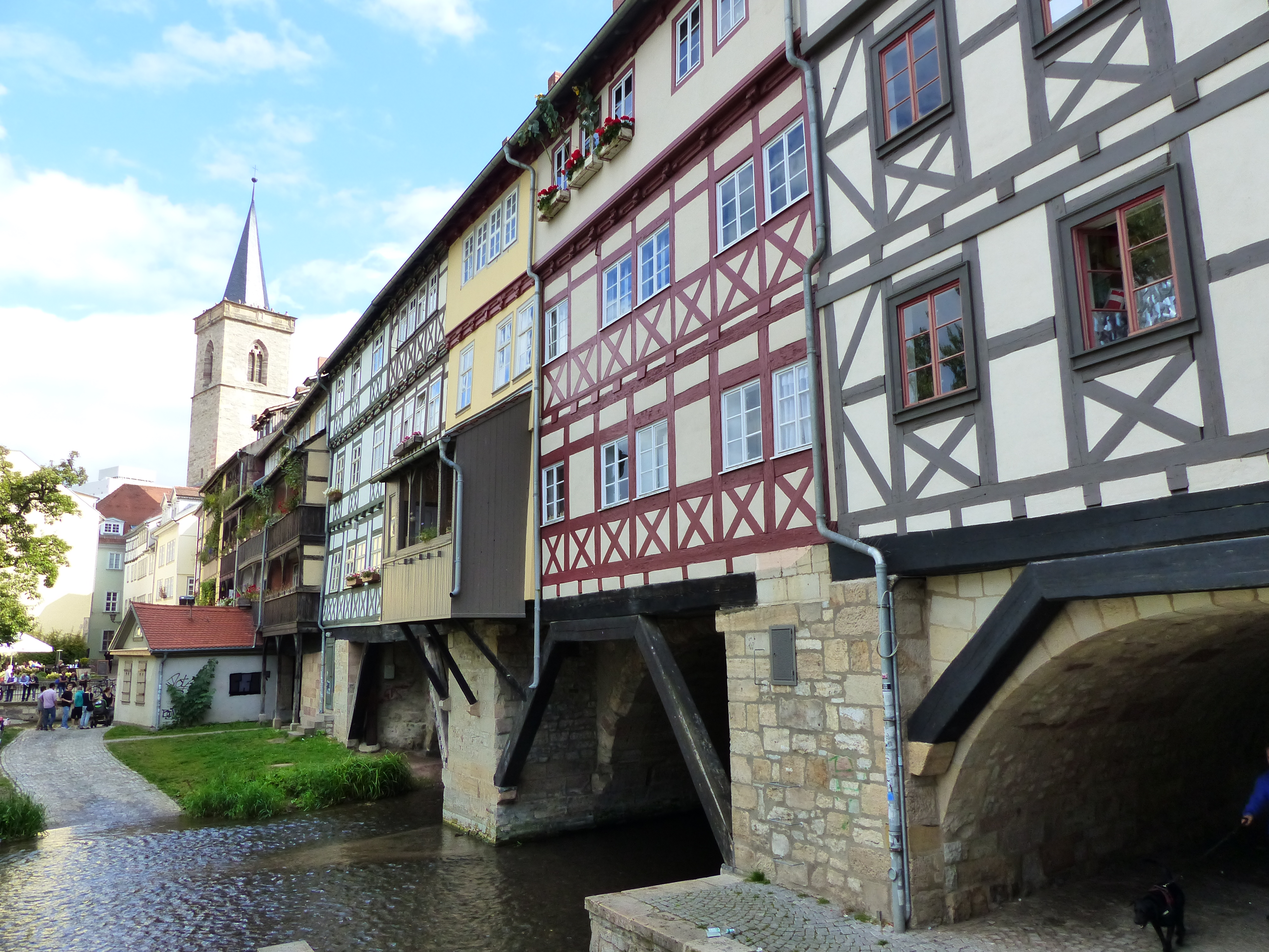 WLM-Fototour Erfurt 2014 Dieses Foto wurde im Rahmen der WLM-Fototour 2014 in Erfurt erstellt, die vom 29. bis 31. August 2014 zum Auftakt des Wettbewerbs Wiki Loves Monuments 2014 statt fand. The making of this document was supported by the Community-Budget of Wikimedia Germany. Krämerbrücke in Erfurt